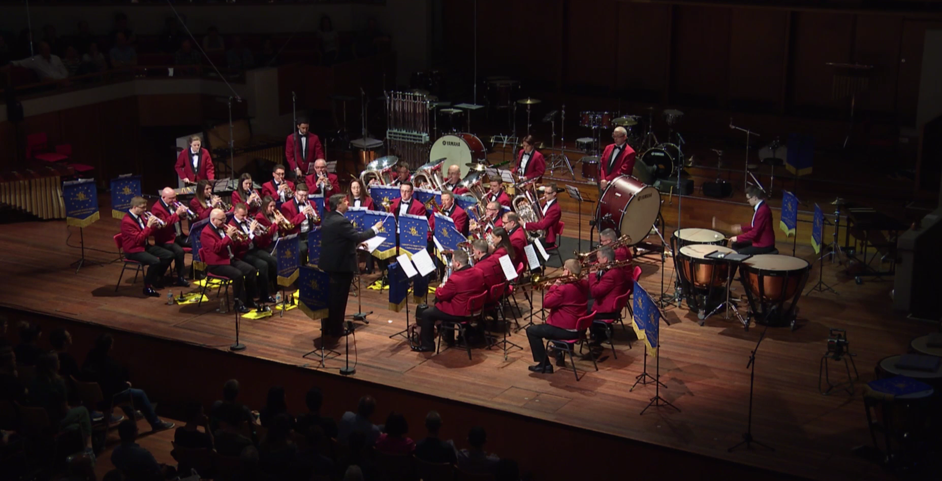 Whitburn